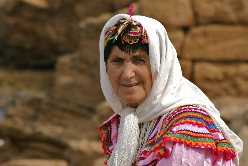 Kabyle